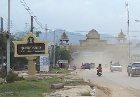 ประตูเมืองลับแล หลังจากผ่านเหตุการณ์โคลนถล่ม Laplae,Uttaradit, Thailand.